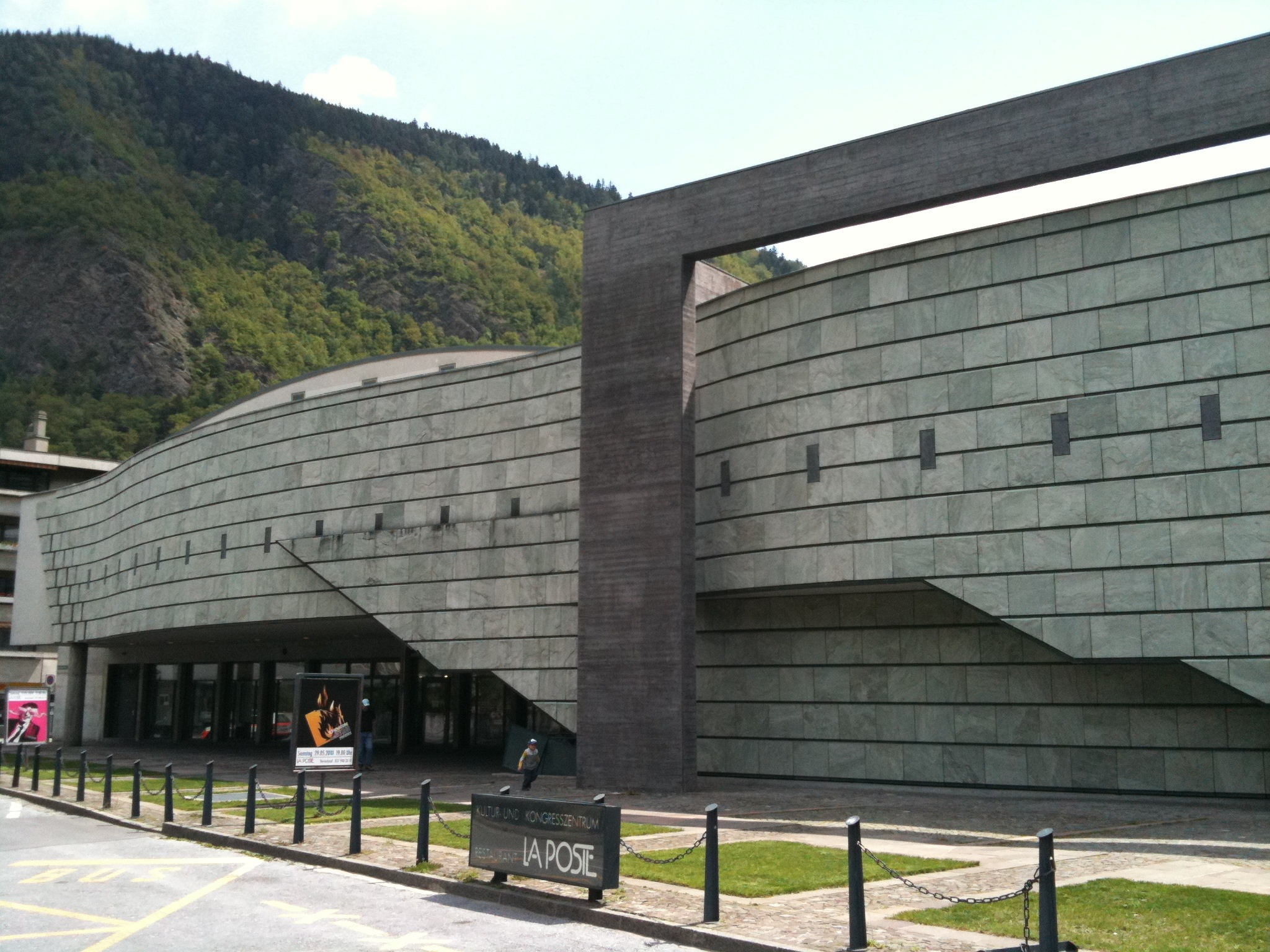 Kultur- und Kongresszentrum La Poste in Visp, Kanton Wallis